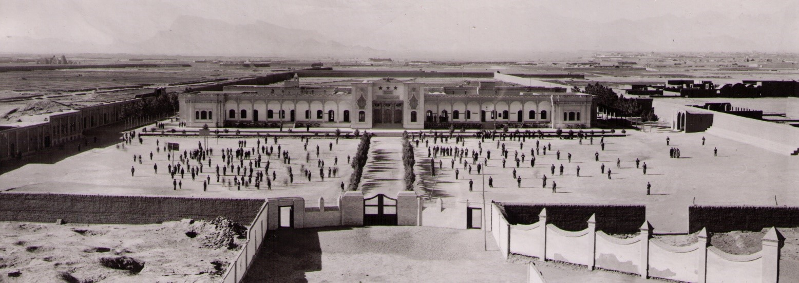 عکس قدیمی خوابگاه شبانه روزی دانش آموزان دبستان و دبیرستان مارکار